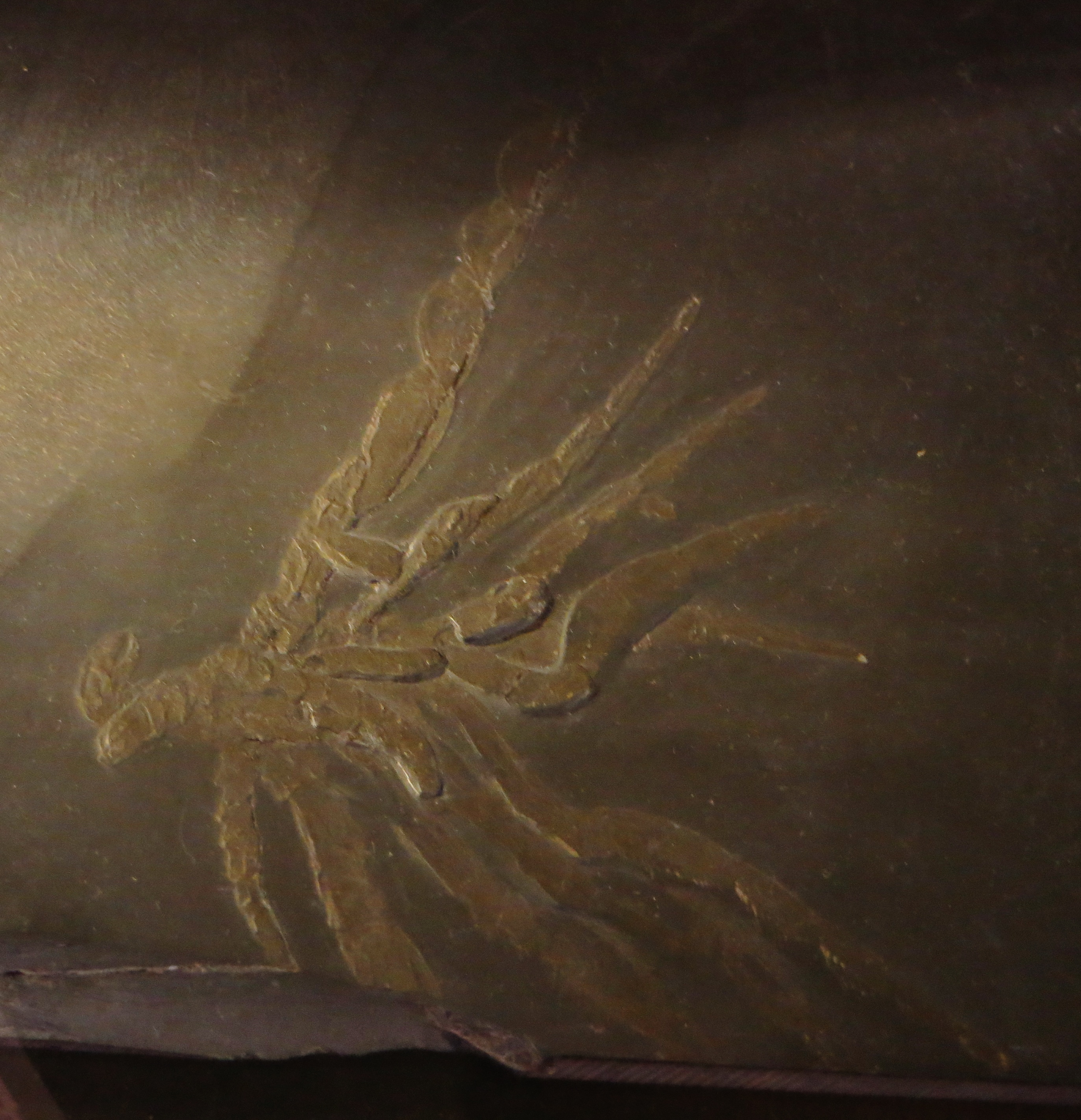 Fossil of Palaeoisopus - Took the picture at Museon, Den Haag